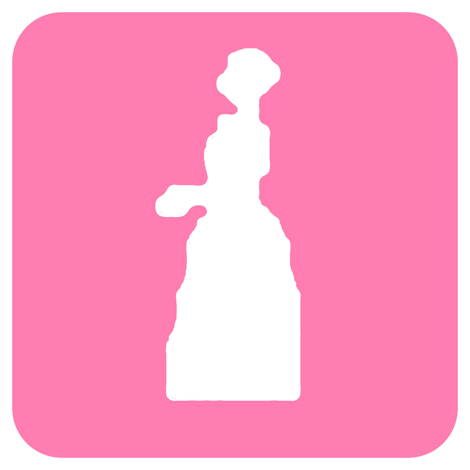 Símbolo utilizado para identificar a la estación Rosario en 2001.